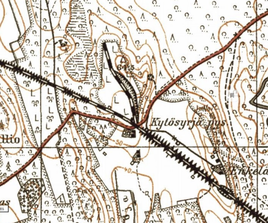 Схема Кютёсюрья